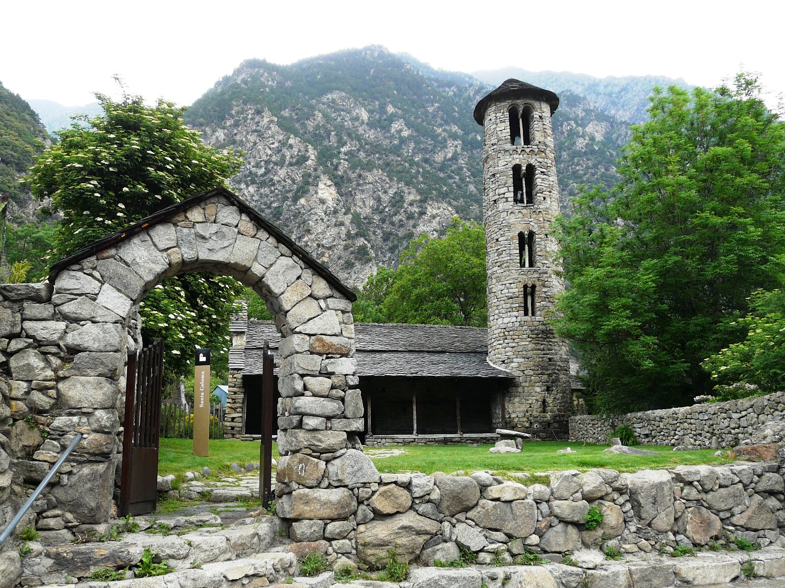 Església de Santa Coloma